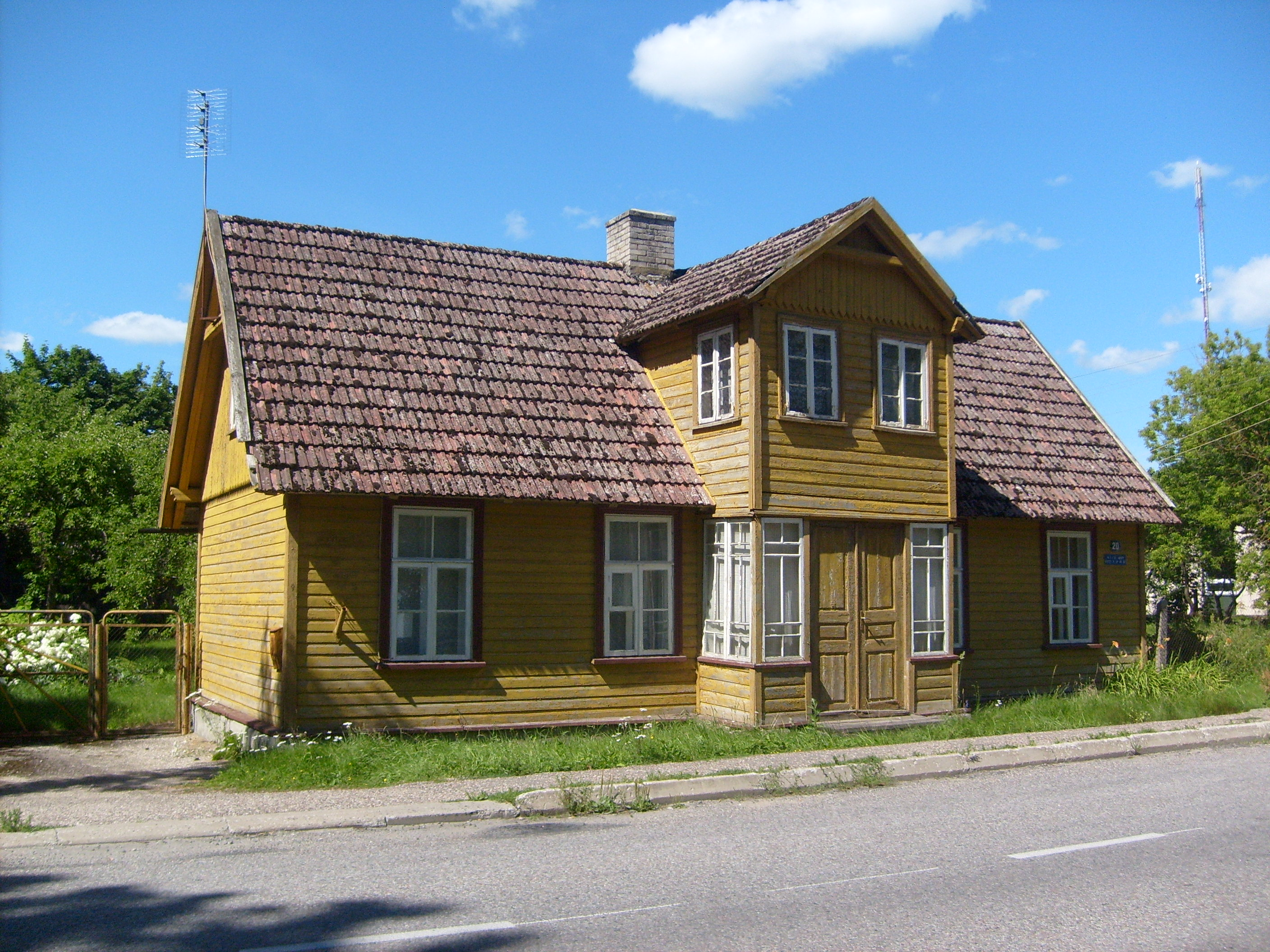 A house in Käina, Estonia